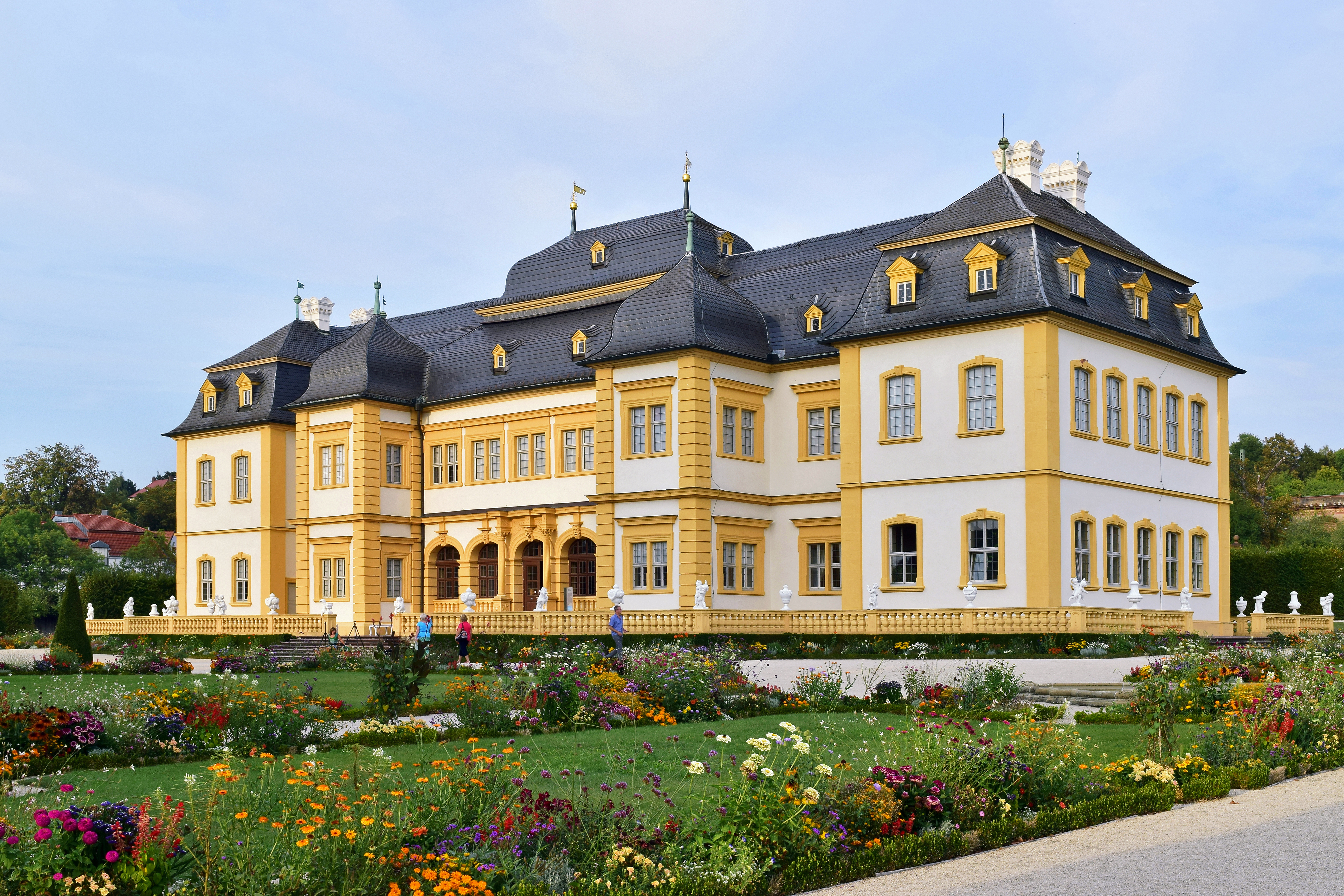 Das Schloss Veitshöchheim wurde von 1680 bis 1682 als Sommerresidenz der Fürstbischöfe von Würzburg errichtet und diente später den Königen von Bayern. Letzte Bauarbeiten fanden unter Johann Balthasar Neumann im Jahre 1753 statt.This is a photograph of an architectural monument.